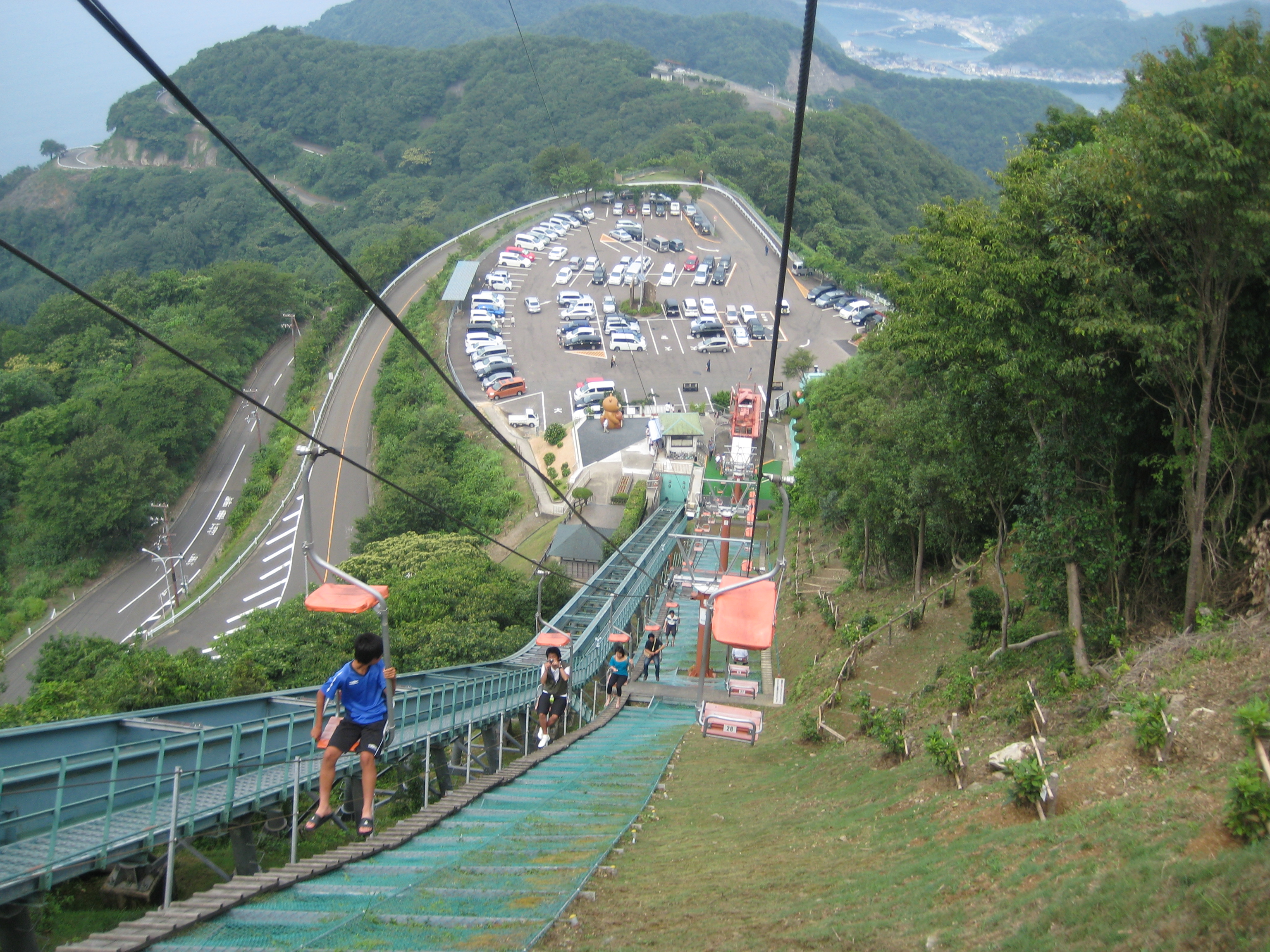 三方五湖レインボーライン山頂公園におけるリフトおよびケーブルカー。